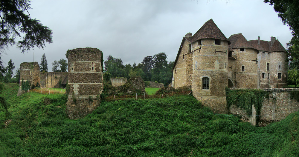 Château d'Harcourt, Eure, Normandie, France.